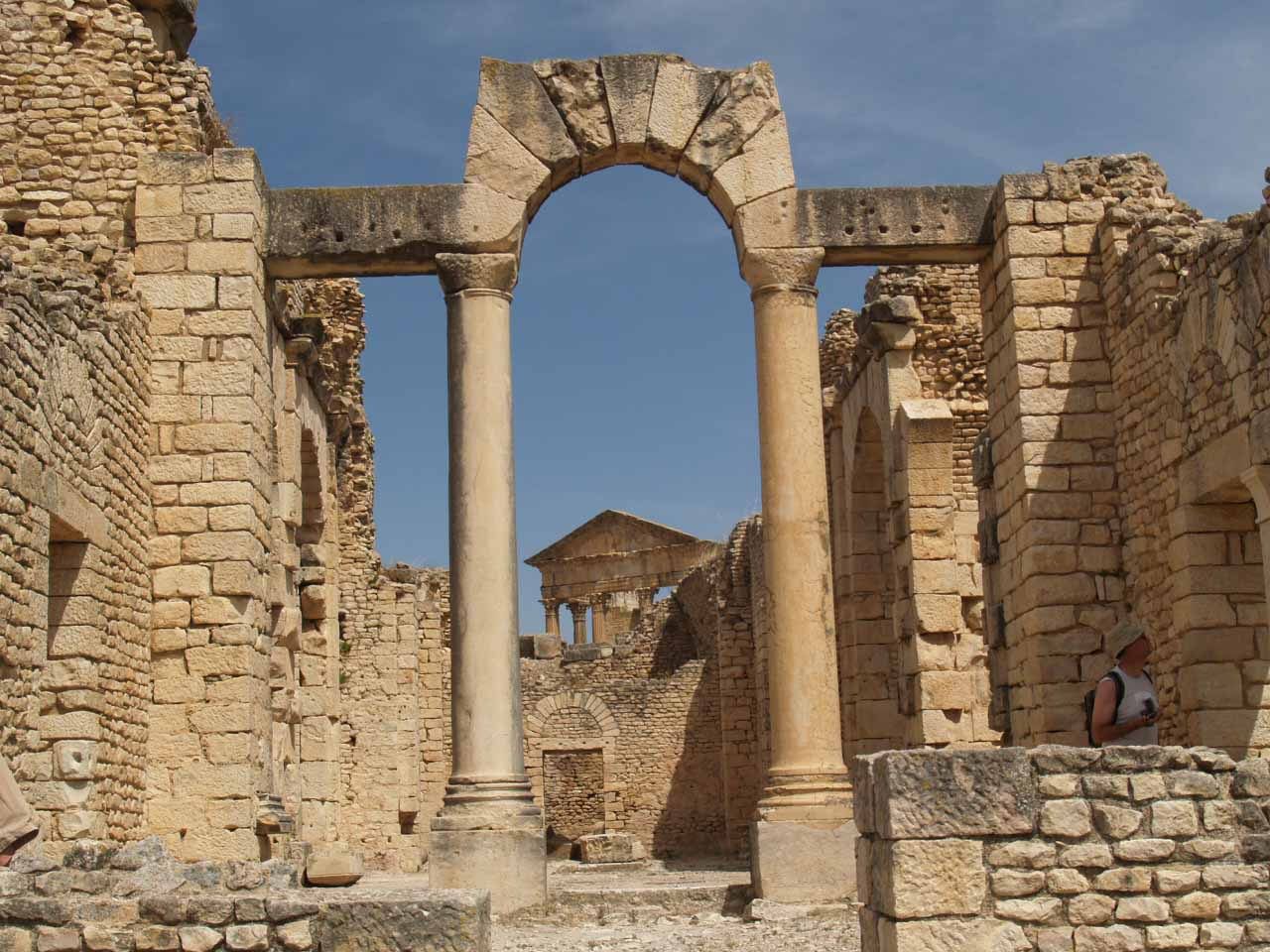 Dougga